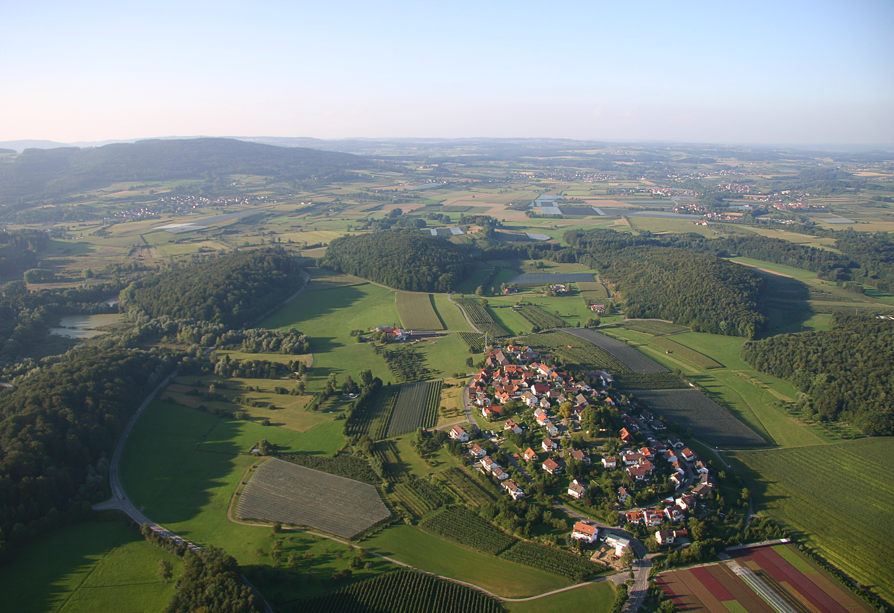 Der auf einem Drumlin gelegene Teilort Raderach, Friedrichshafen